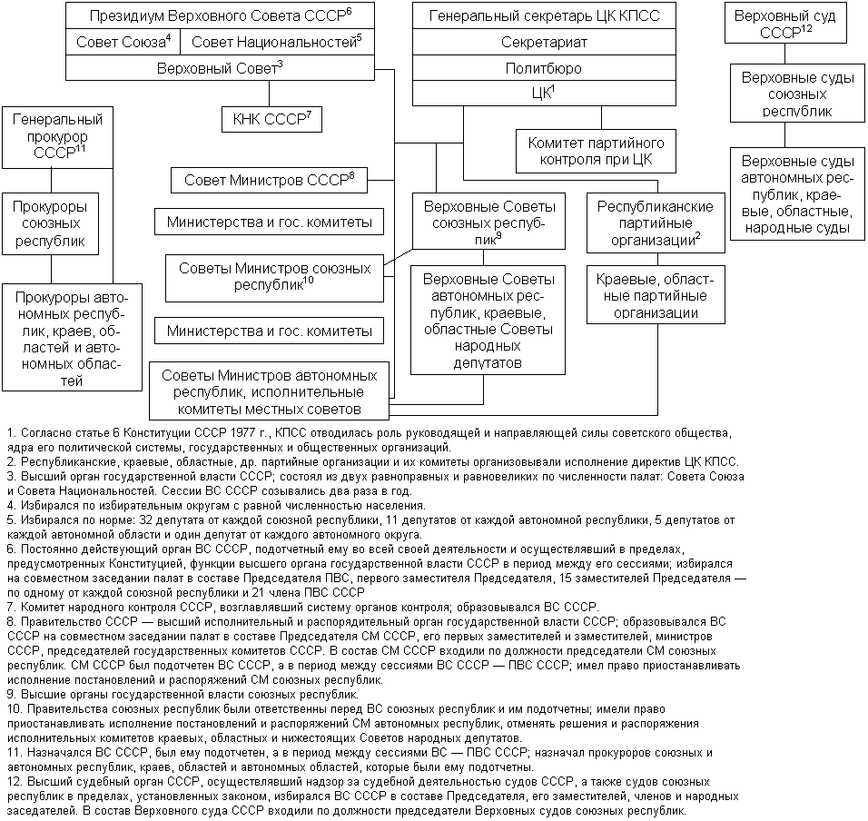 Осуществление государственной власти в СССР (По Конституции 1977)